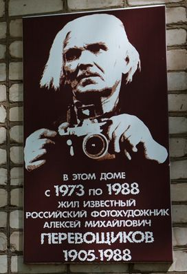 Мемориальная доска на доме, где жил А. М. Перевощиков